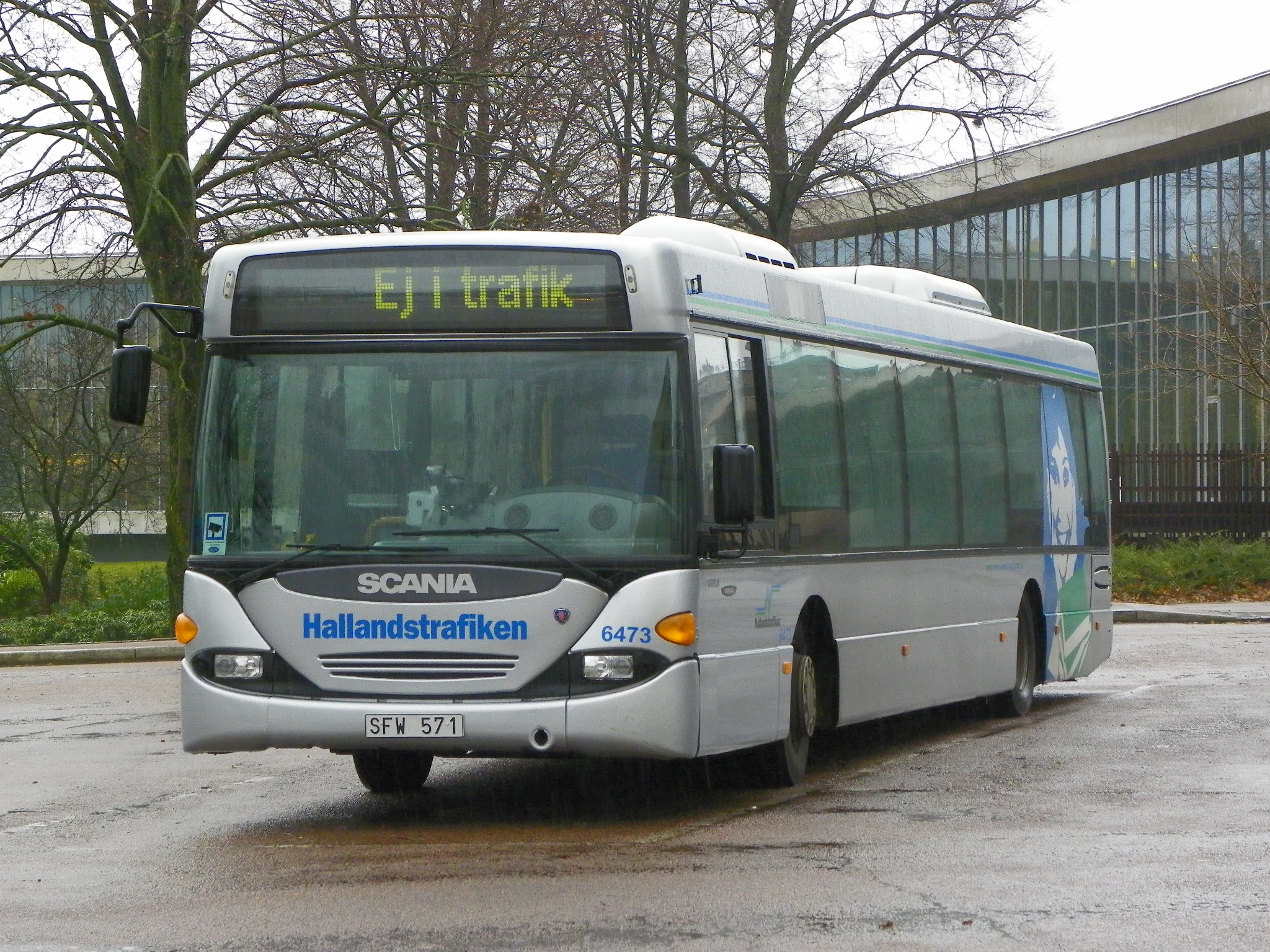 Arriva 6473 in Halmstad